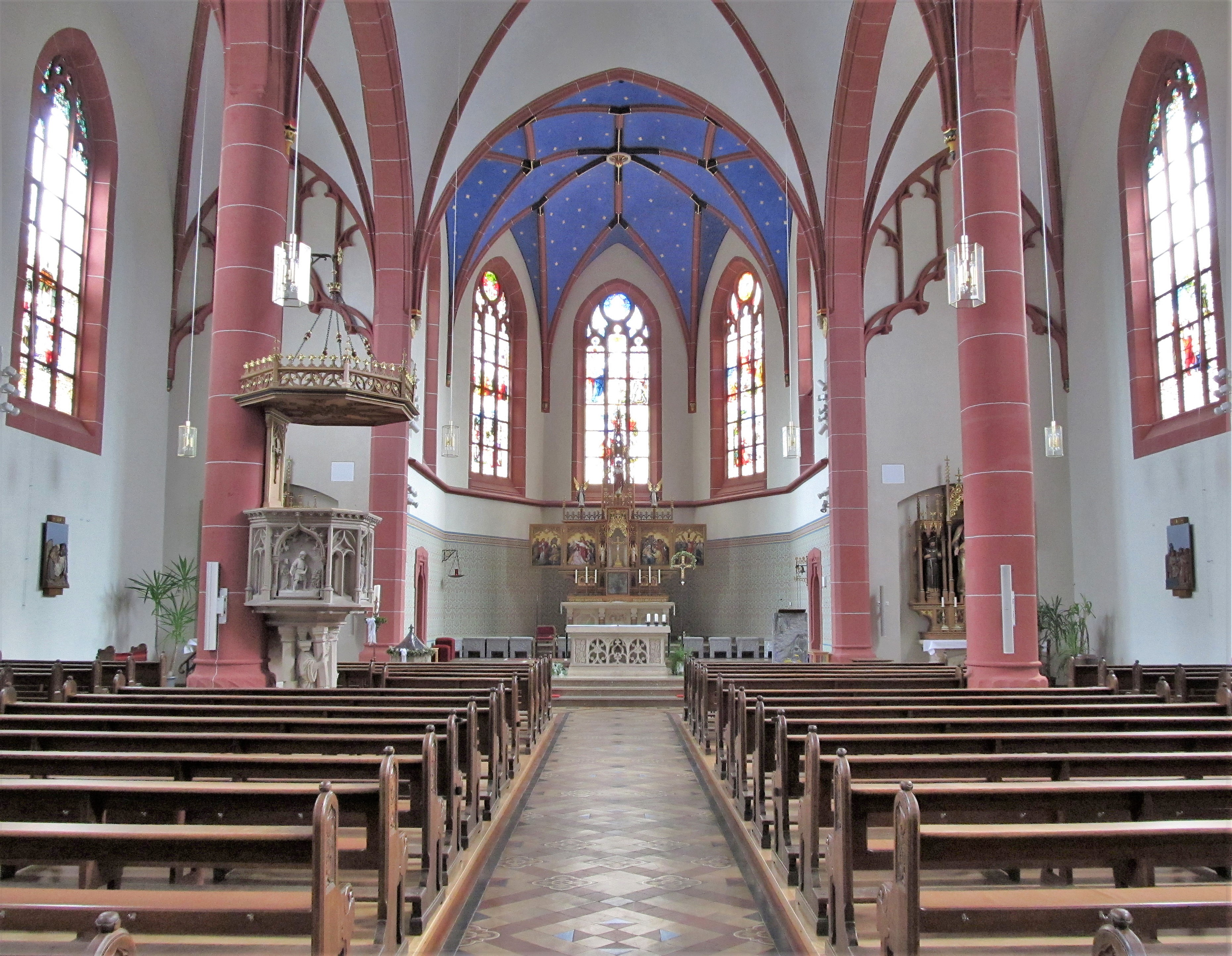 Blick ins Innere der katholischen Pfarrkirche St. Andreas in Homburg-Erbach, Saarland